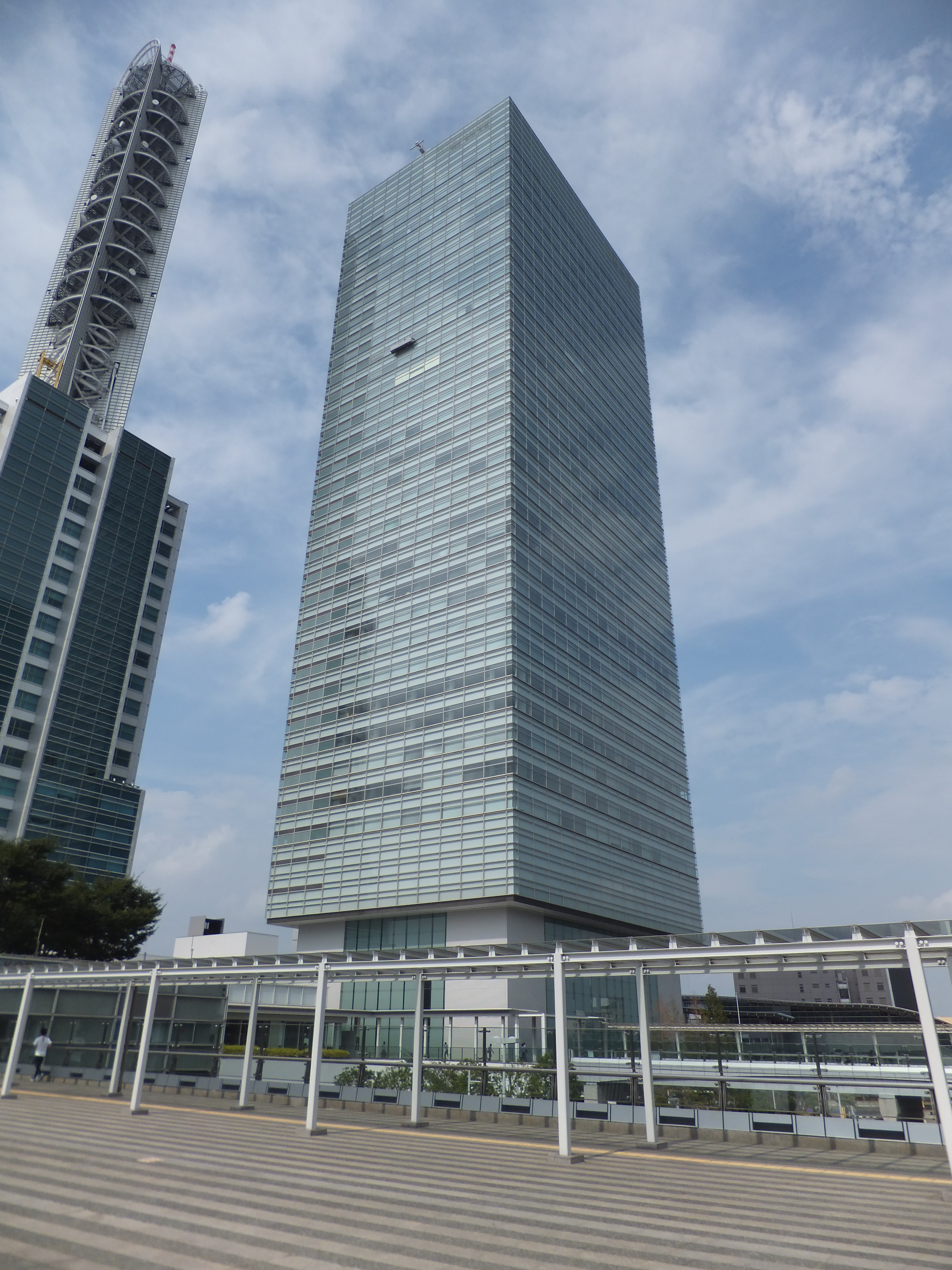 明治安田生命さいたま新都心ビル ランド・アクシス・タワー（さいたま市中央区）